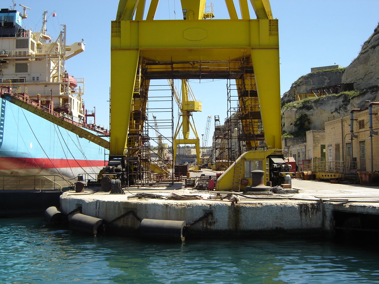 Boote und marine Anlagen, Zubehör und Details. Malta, April 2006. Unterbau eines auf Schienen stehenden Dockkrans.